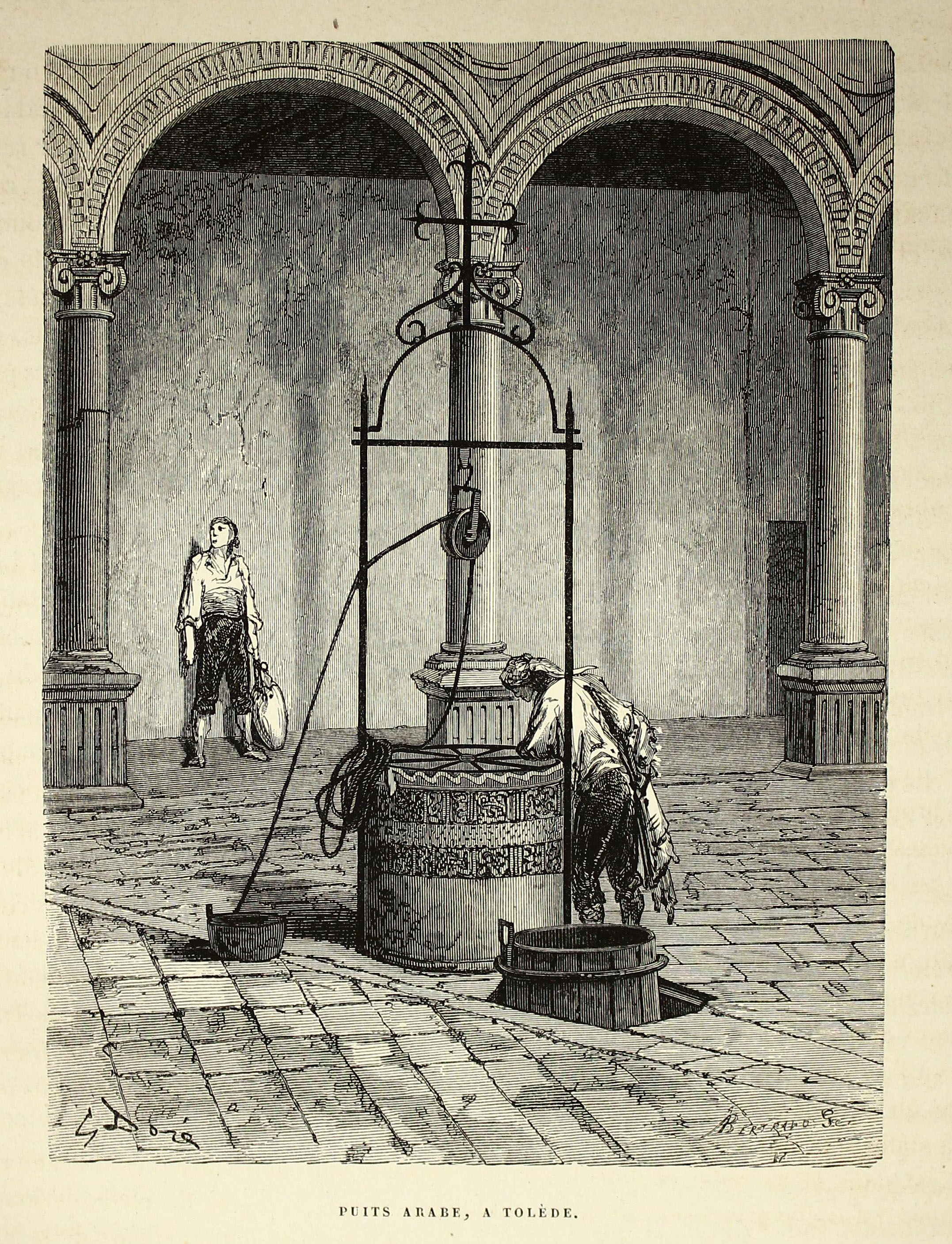 Autor: Davillier, Jean Charles, barón, 1823-1883 Descripción bibliográfica: L'Espagne / par Le Baron CH. Davillier ; ilustrée de 309 gravures dessinées su bois par Gustave Doré. - Paris : Librairie Hachette, 1874. - 799 p. : il. Materia: España- Geografía Materia: España- Usos y costumbres Ilustrador: Doré, Gustave, 1832-1883 Editor: Libreria Hachette Lugar de impresión: Francia, París Localización: Libro completo